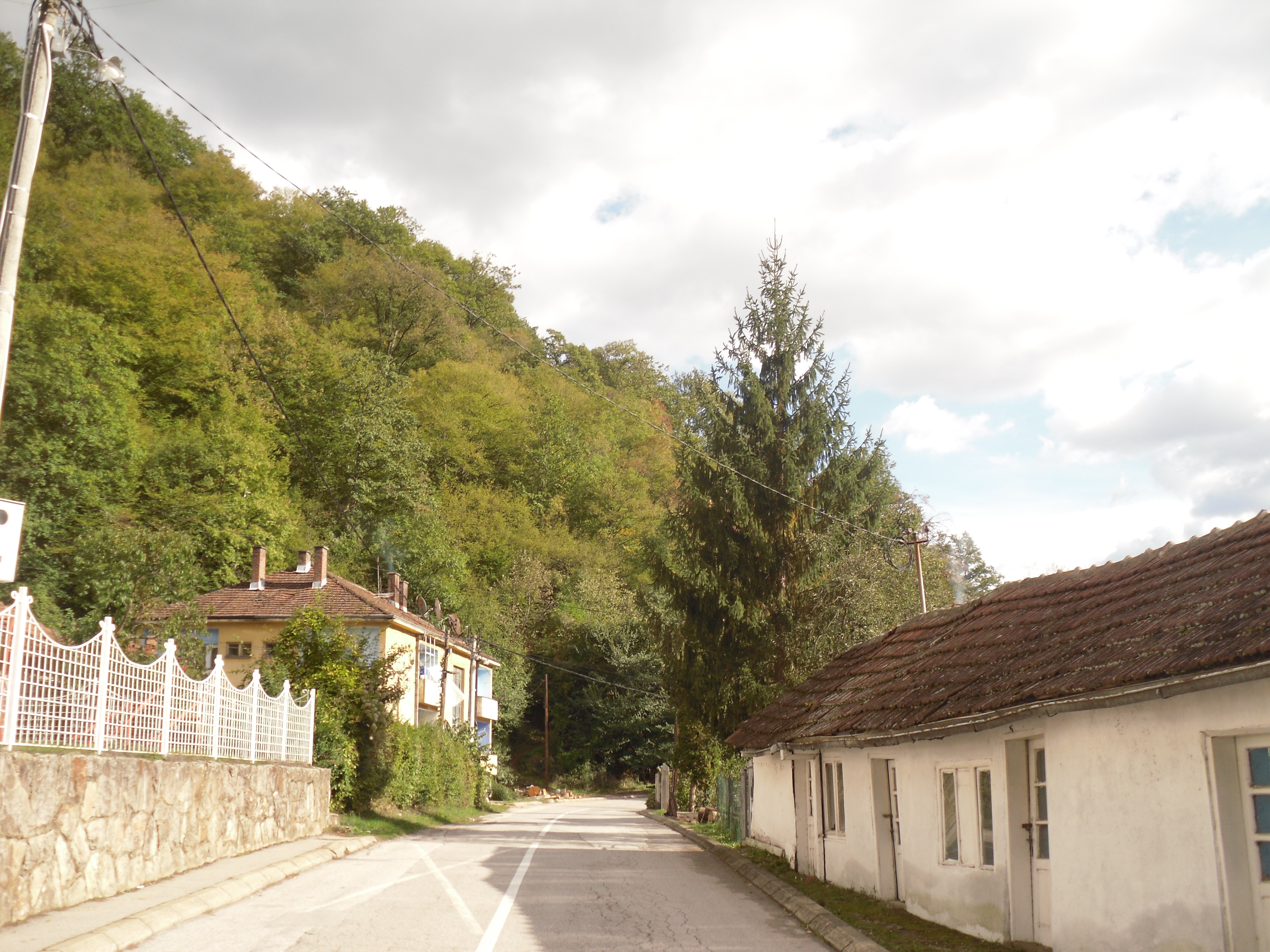 Srpski (latinica): Ulica kralja Milana